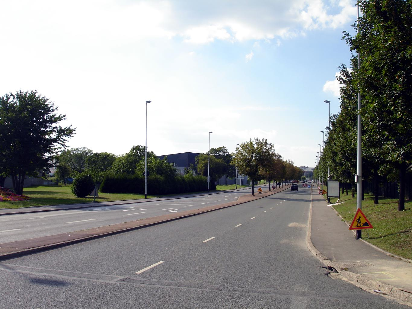 L'avenue du Général-de-Gaulle (en direction de l'ouest) à Garges-lès-Gonesse (Val-d'Oise), France